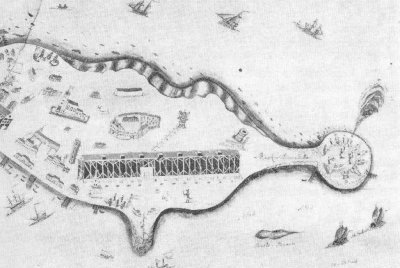 Gammel kart over Valløy ved Tønsberg